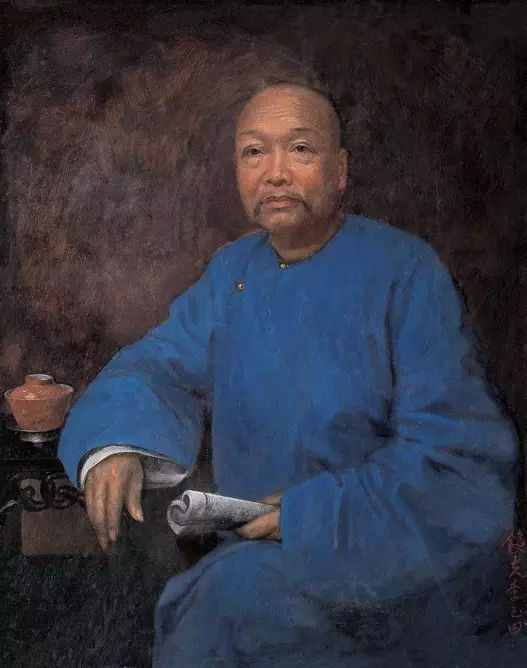 康有為佈上油畫70.7×56cm 1904年